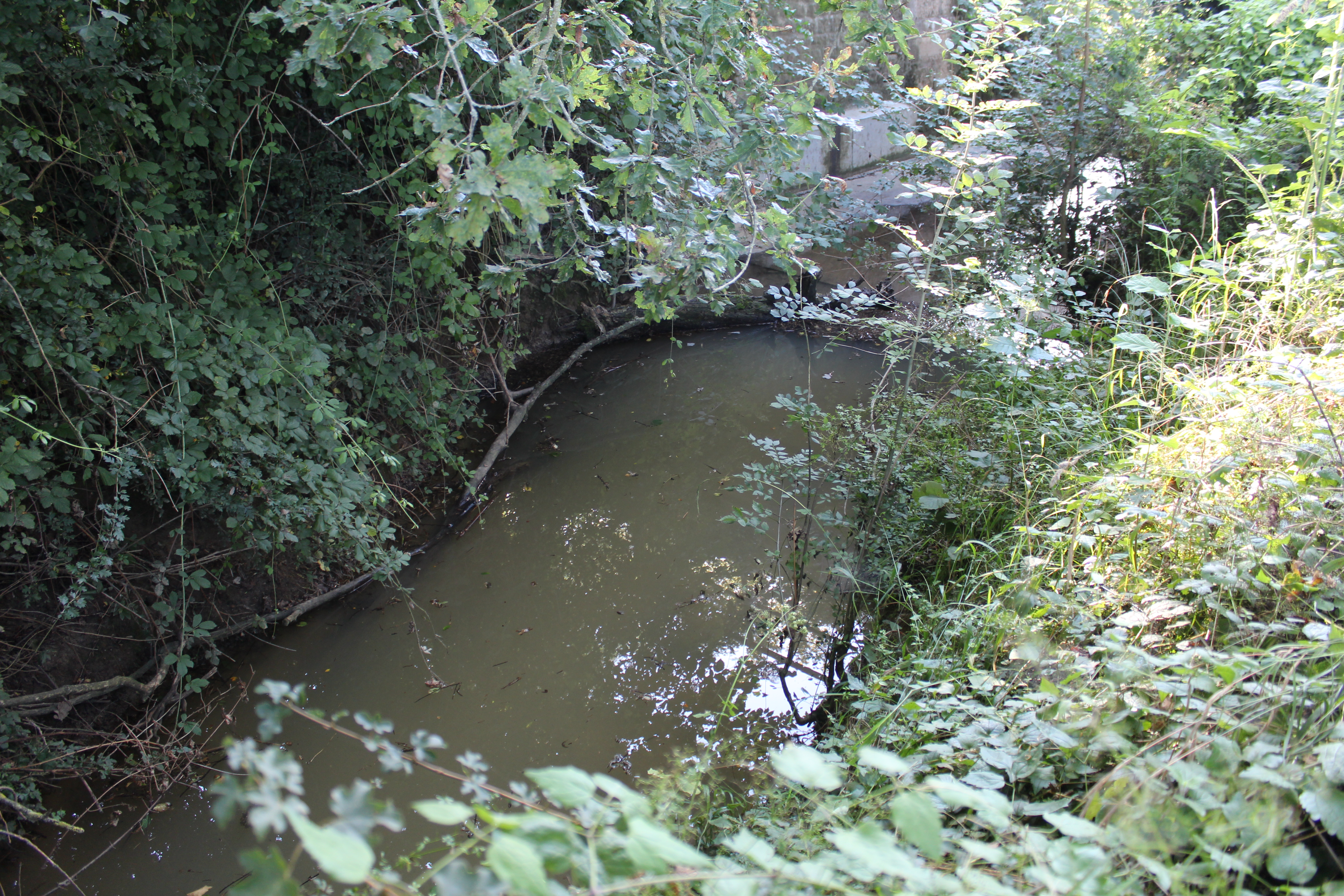 La Loëze à Dommartin dans l'Ain près du hameau de Longecour.